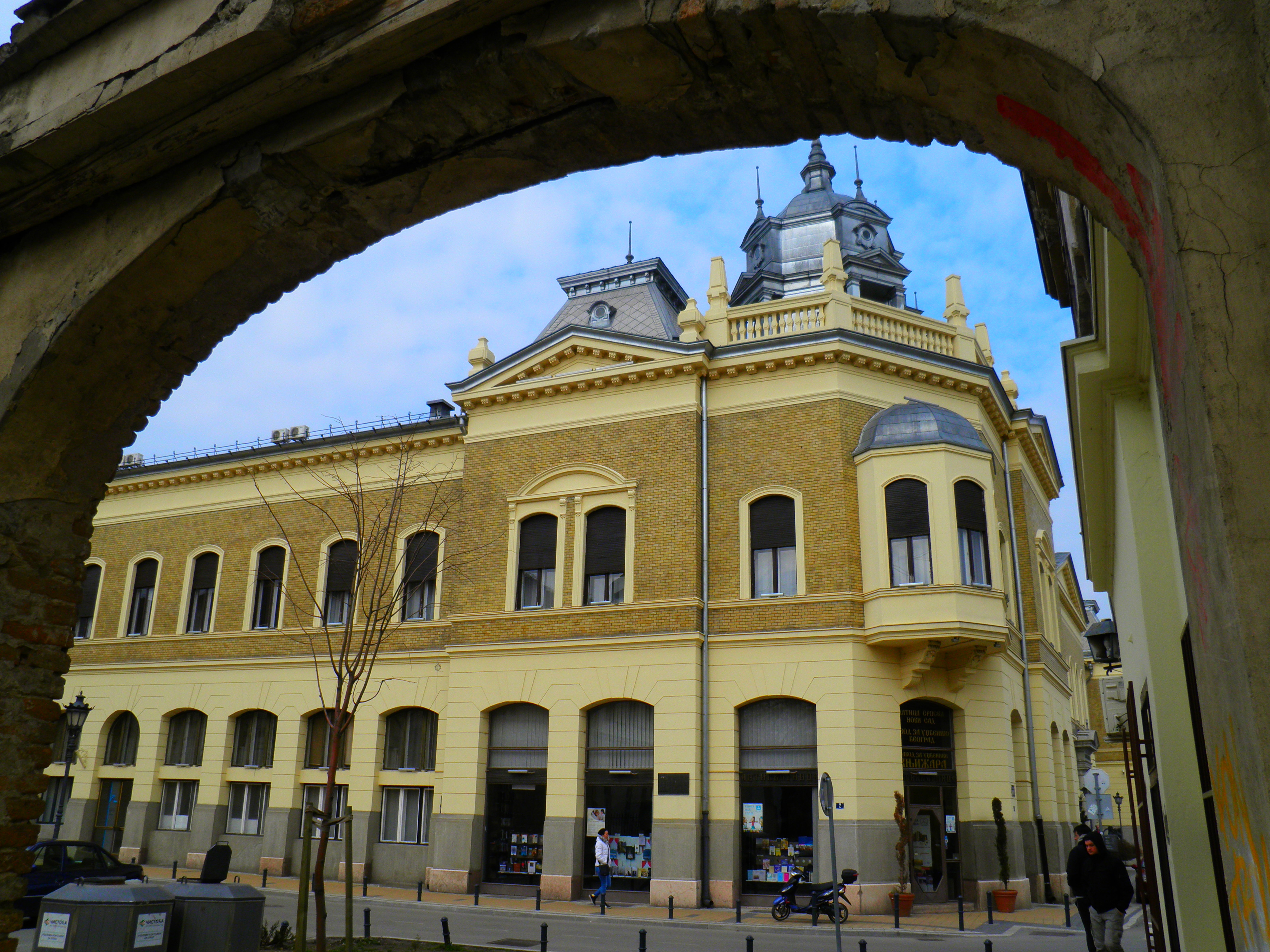 Matica Srpska